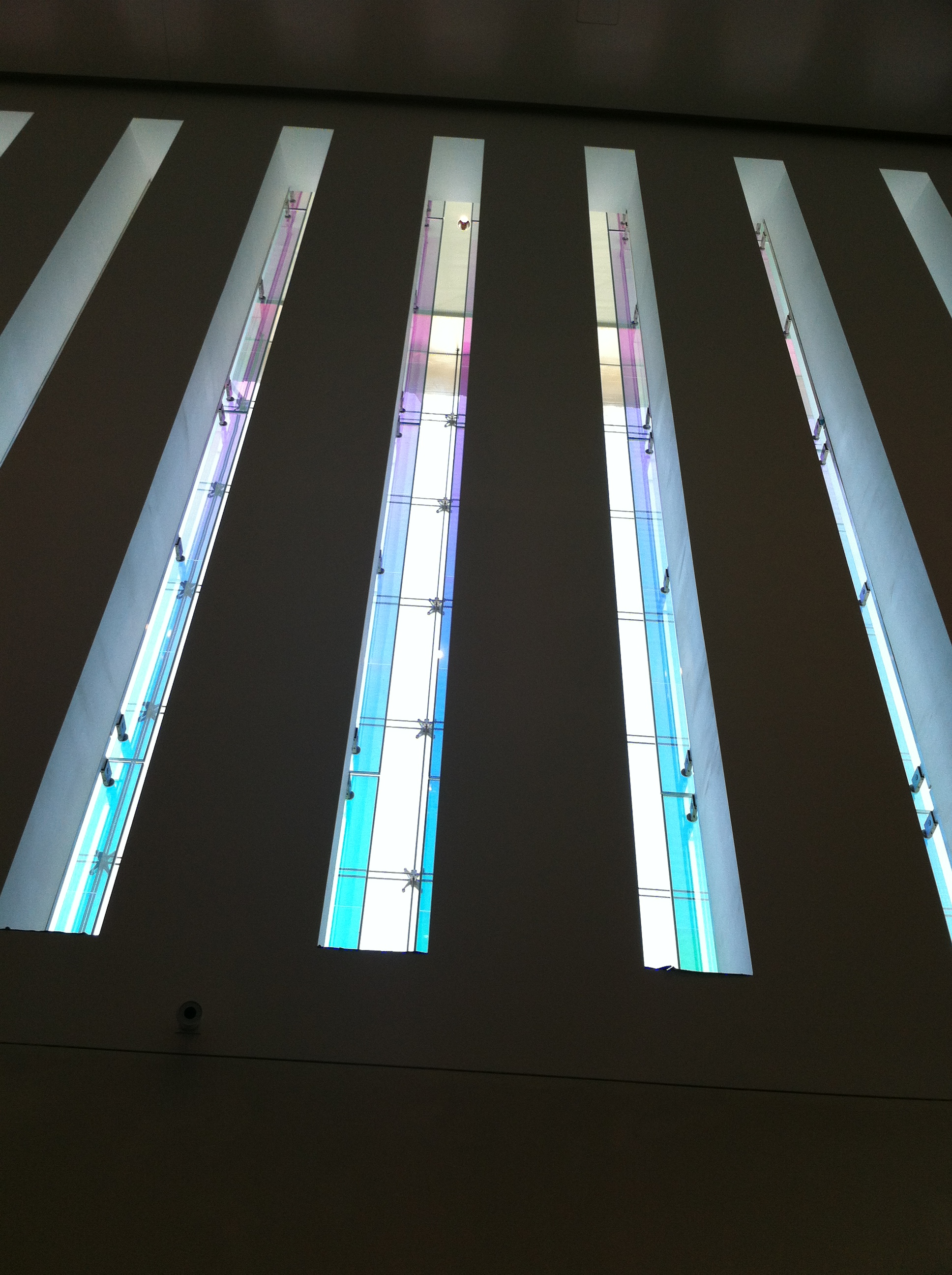 Dichroide Glasfassadenelemente im One World Trade Center in New York